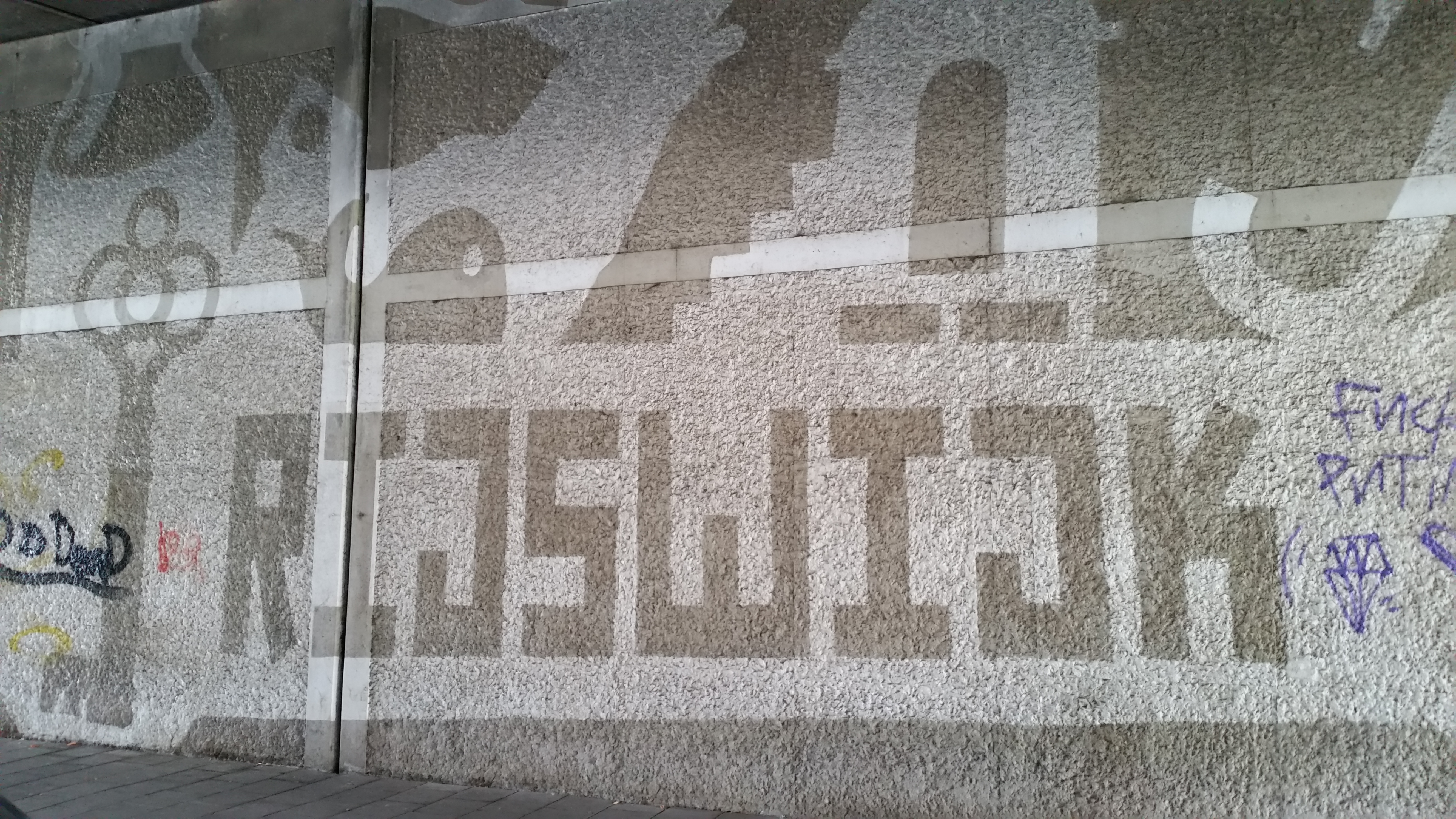 Muurschildering Rijswijkstraatbrug", Rijswijk van "Hotel Rijswijk" (geen echt hotel)